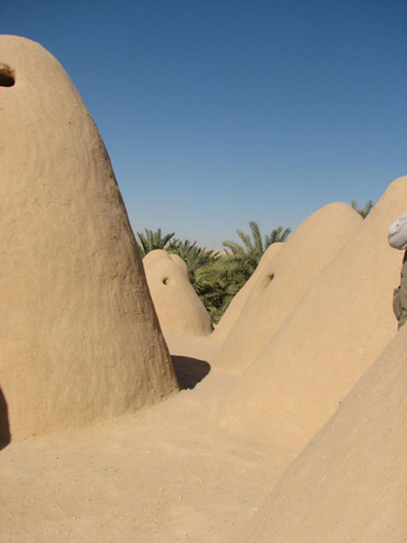 Awjila (Libia) - The Mosque of Atiq